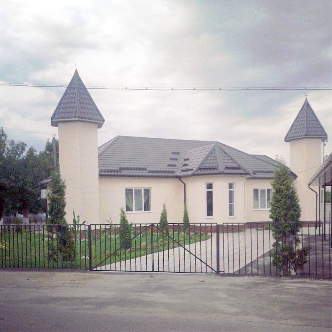 Адыгэбзэ: Докъушыкъуей и зы мэжджыт